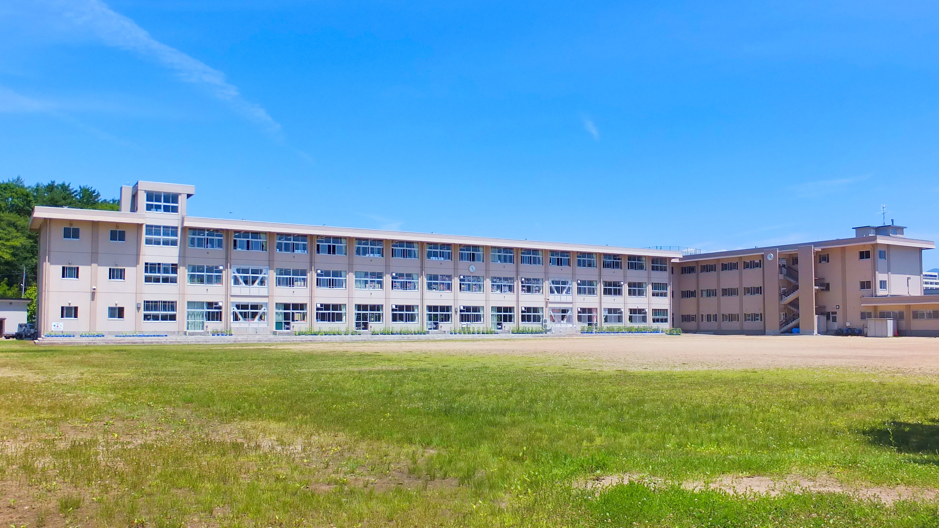 秋田市立広面小学校